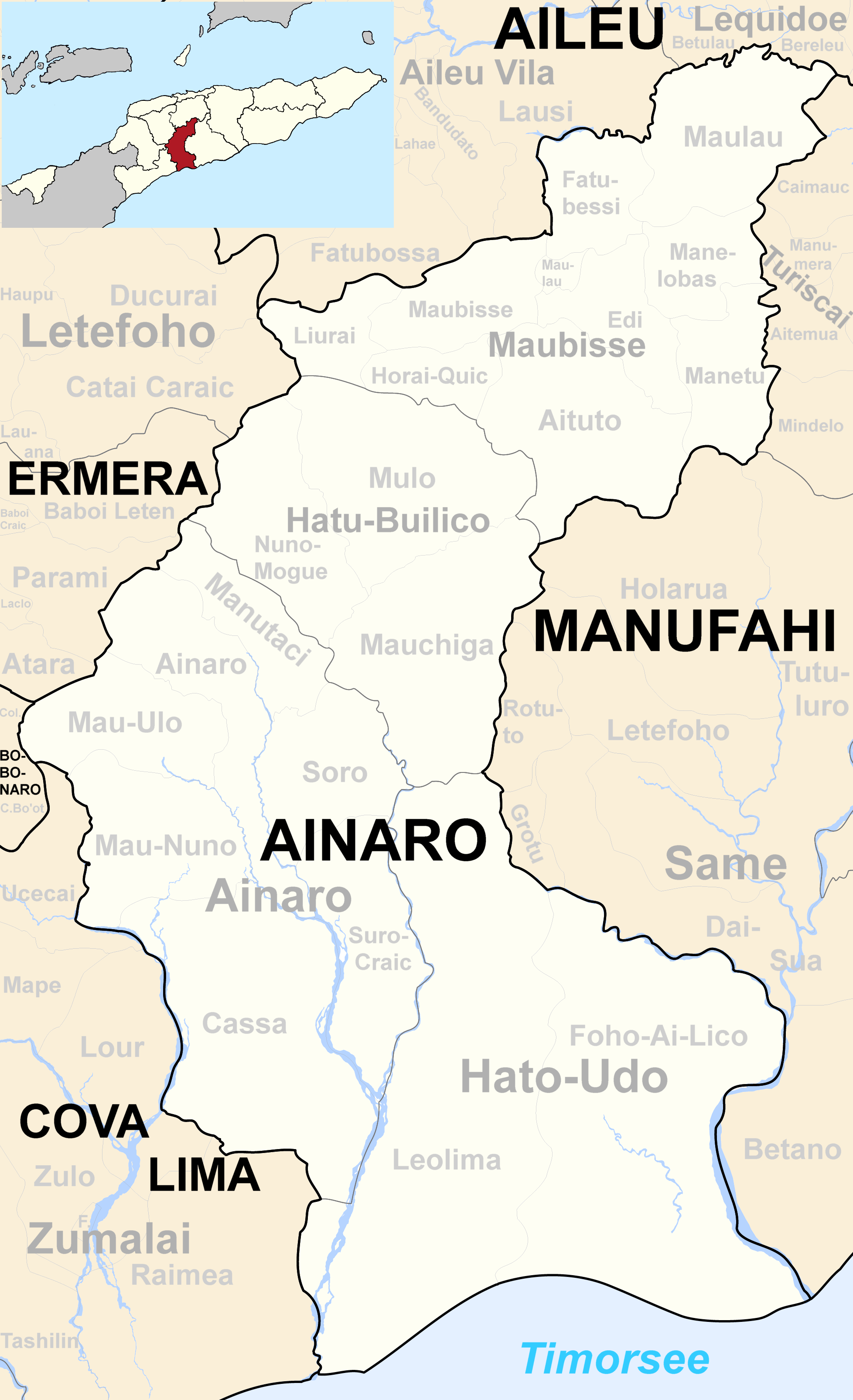 Verwaltungseinheiten der Gemeinde Ainaro, Osttimor.